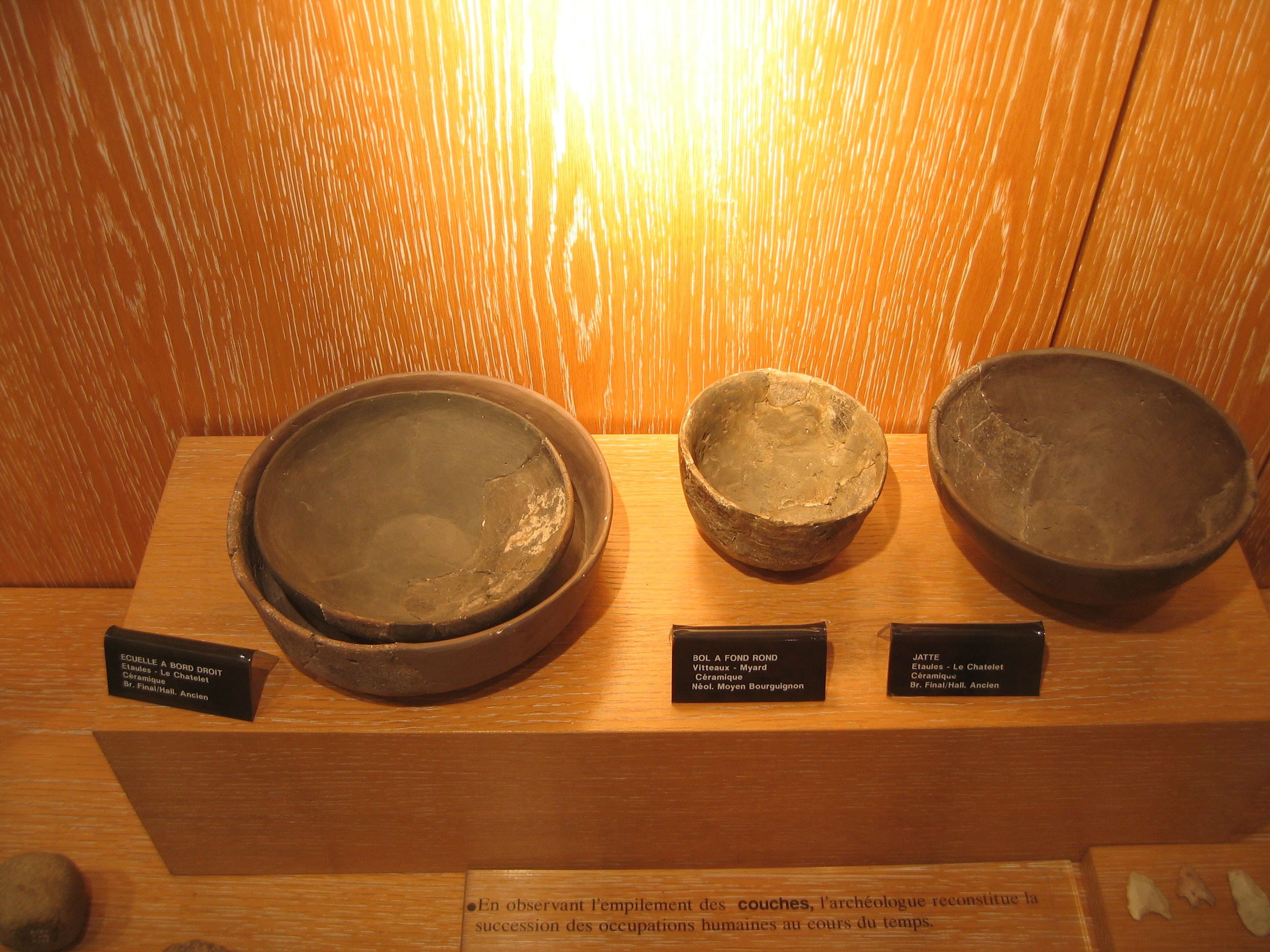 Ecuelle bol jatte musée archéologique Dijon France